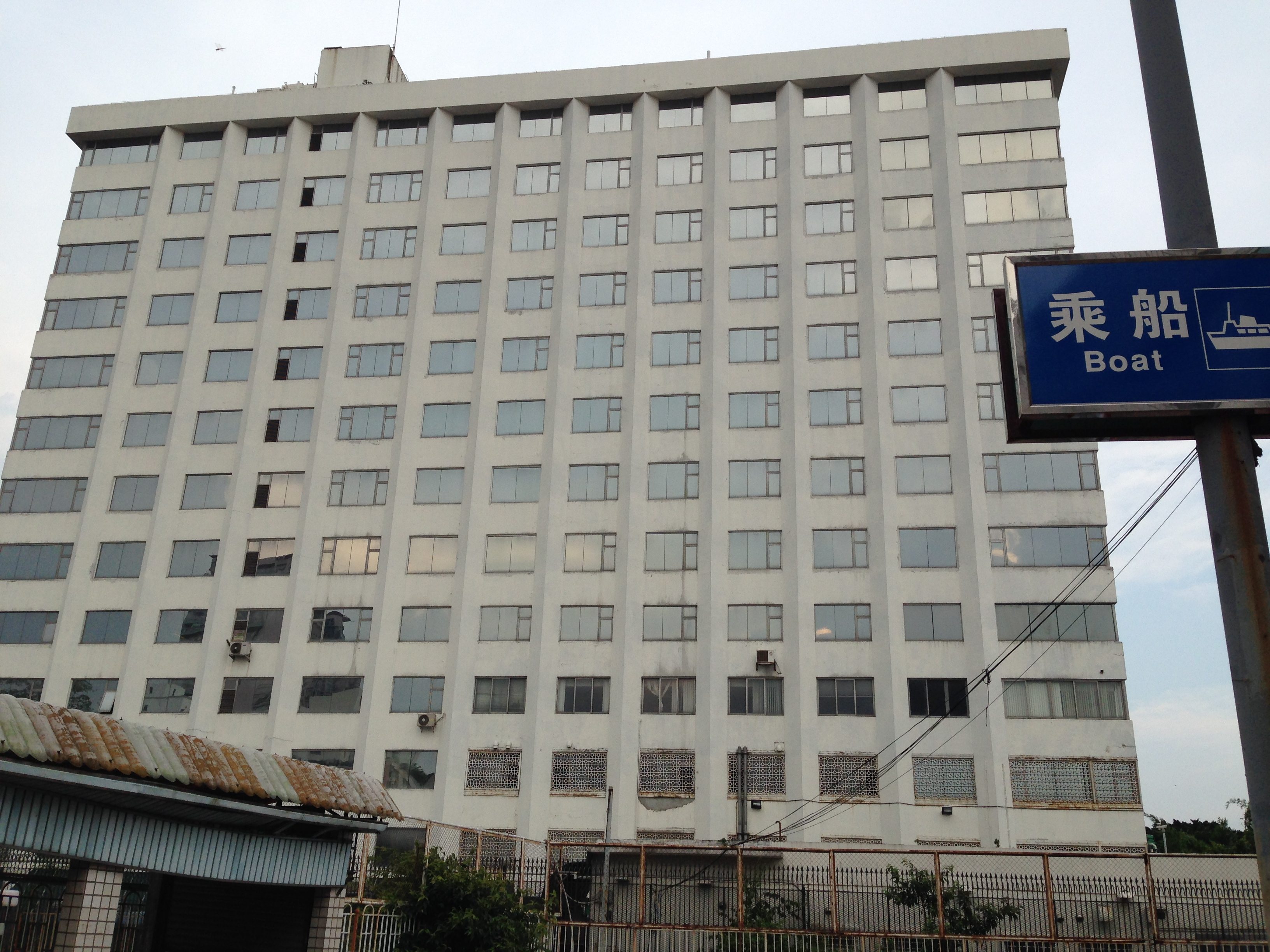 美國駐廣州總領事館（沙面）